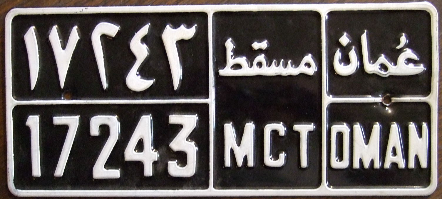 MUSCAT, OMAN passenger 1980's